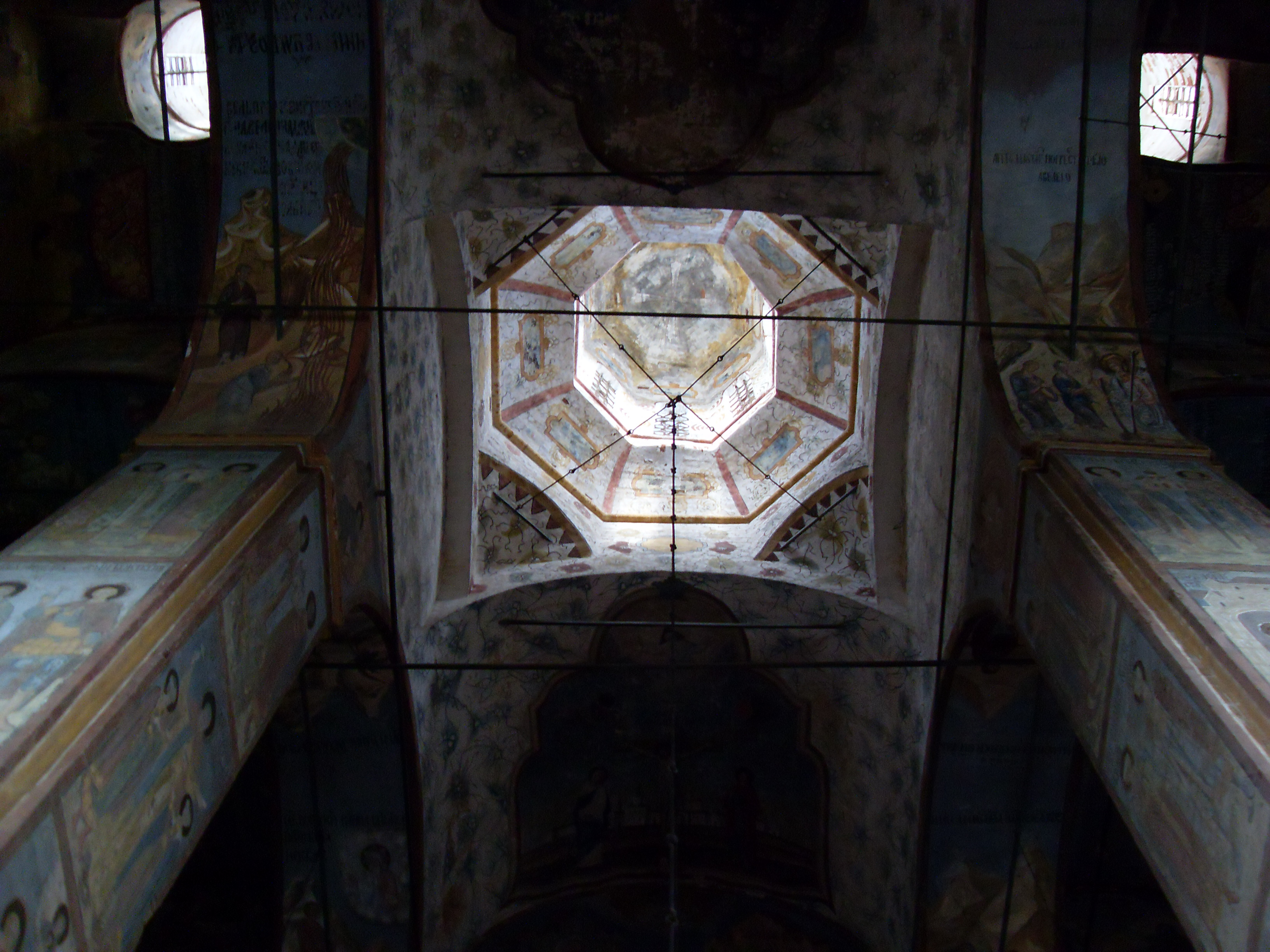 Купол Благовещенского собора г.Сольвычегодск